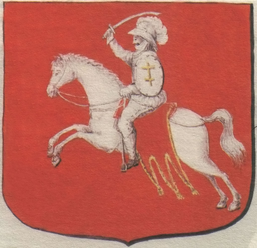 Беларуская (тарашкевіца): Пагоня (Pahonia), герб Вялікага Княства Літоўскага